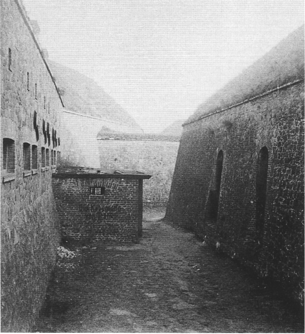 Trenckkasematte im ehemaligen Fort Berge, Magdeburg